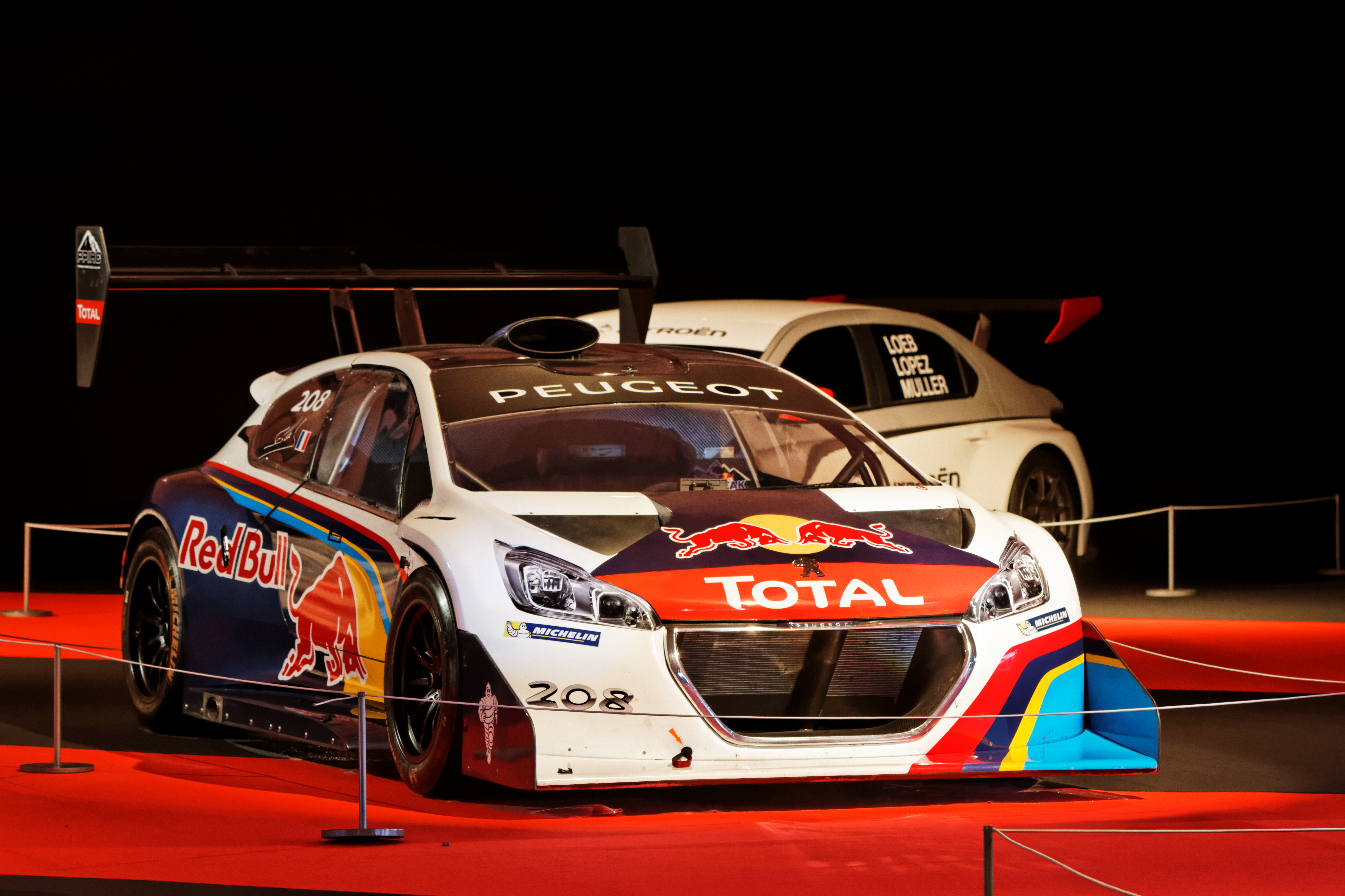 La Peugeot 208 T16 Pikes Peak exposée lors du festival automobile international 2014.